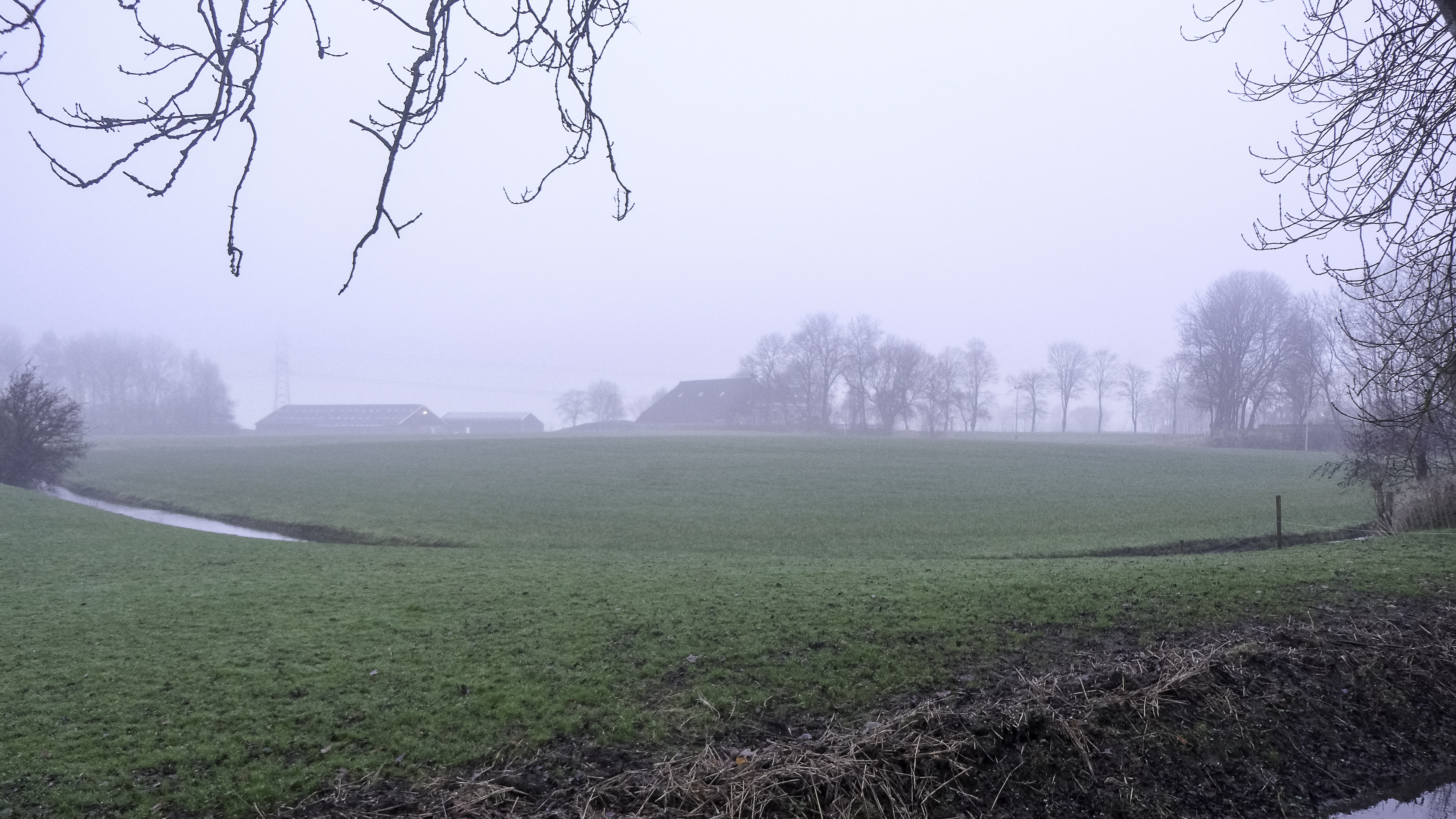 Voormalige borgstee van de Onstaborg te Sauwerd